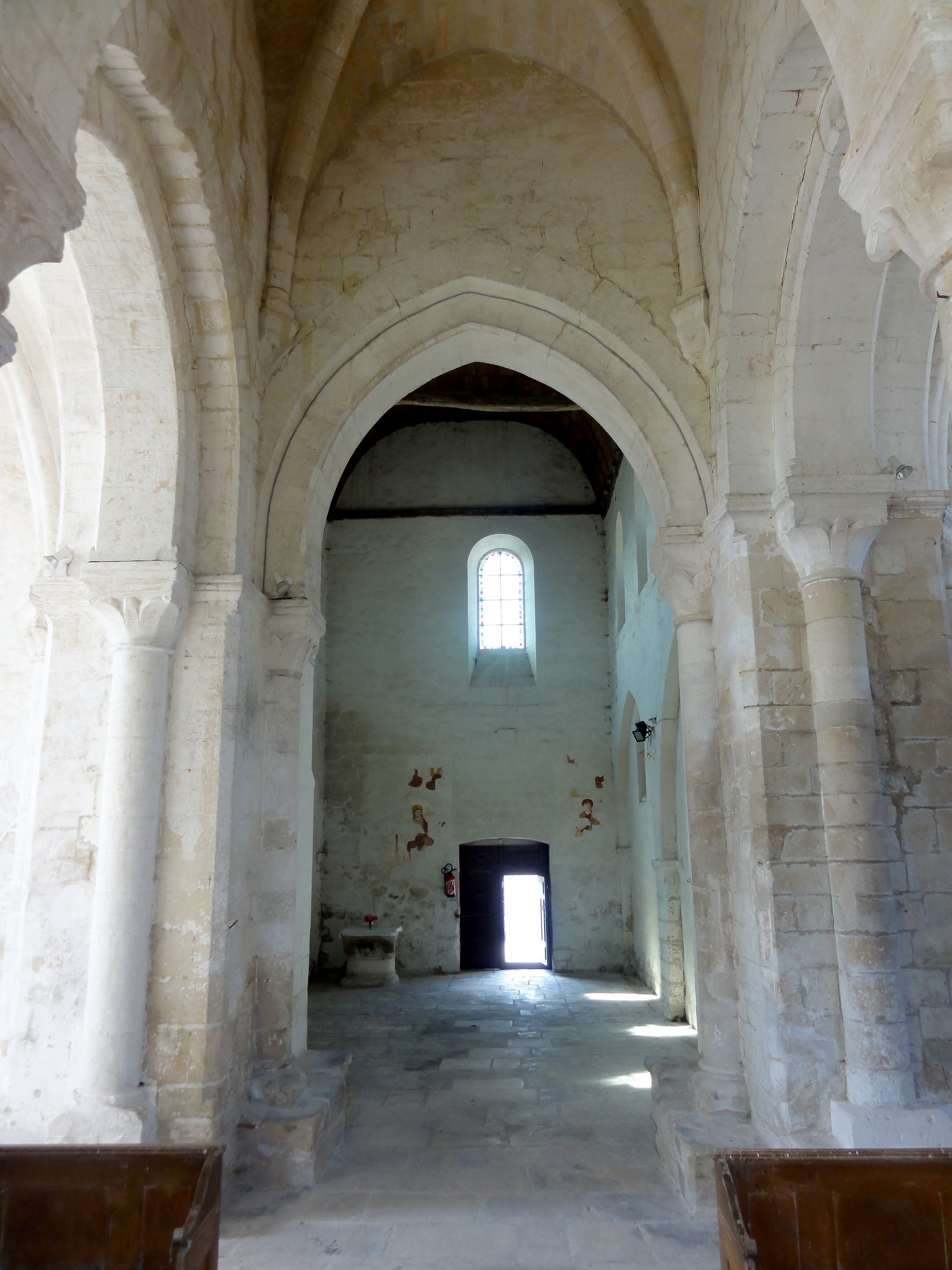 Croisée, vue vers l'ouest.